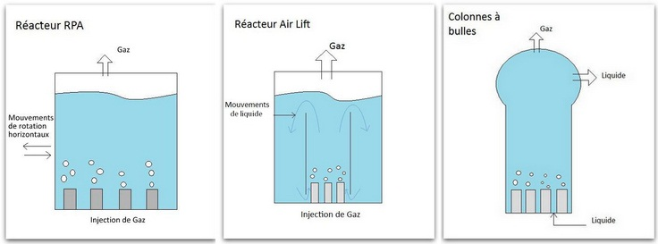 technique de biolixiviation, procédés dynamiques